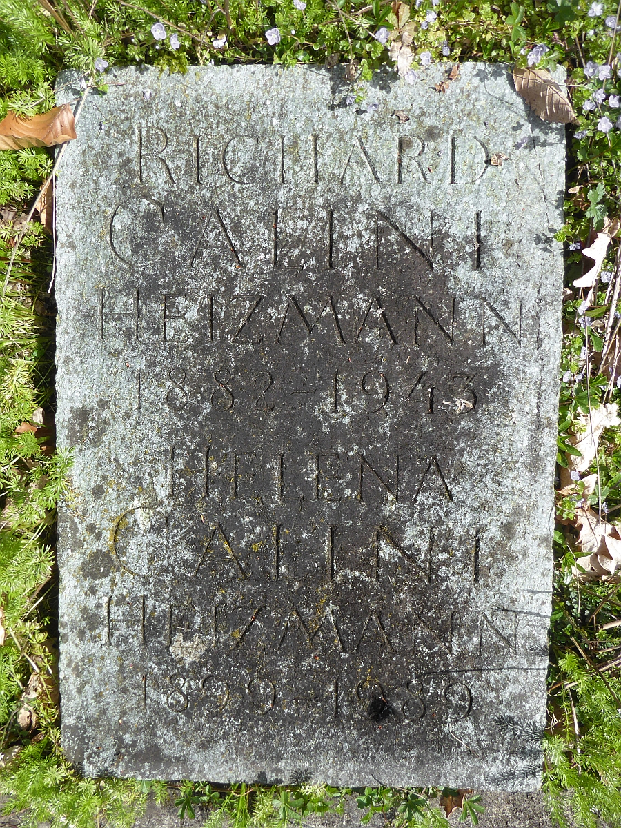 Richard Calini-Heizmann (1882–1943) Architekt, Politiker, Helena Calini-Heizmann (1899–1989) Grab auf dem Friedhof Hörnli, Riehen, Basel-Stadt